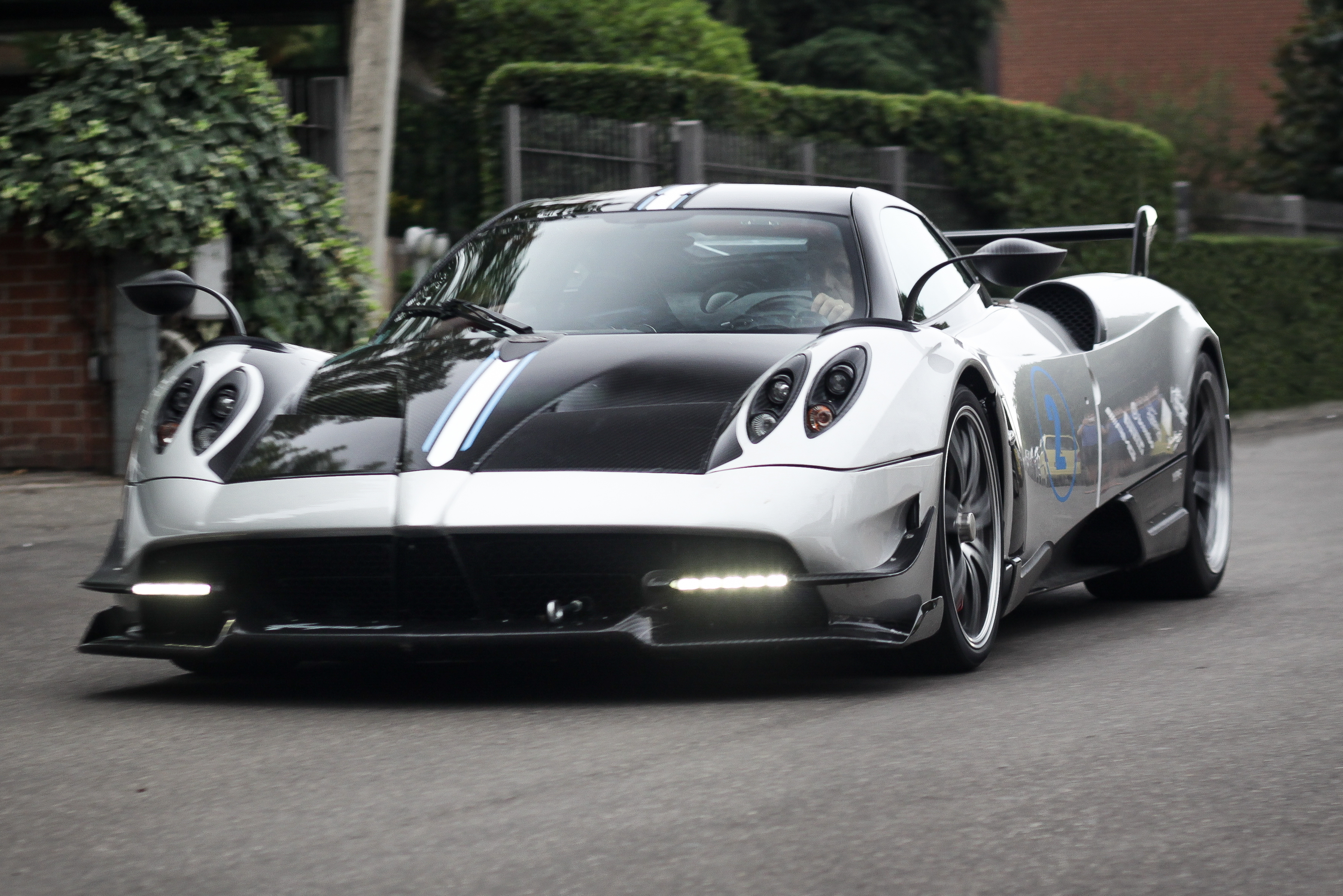 Einen auf 20 Stück limitierten Pagani Huayra den Reuter mitte 2016 sah.